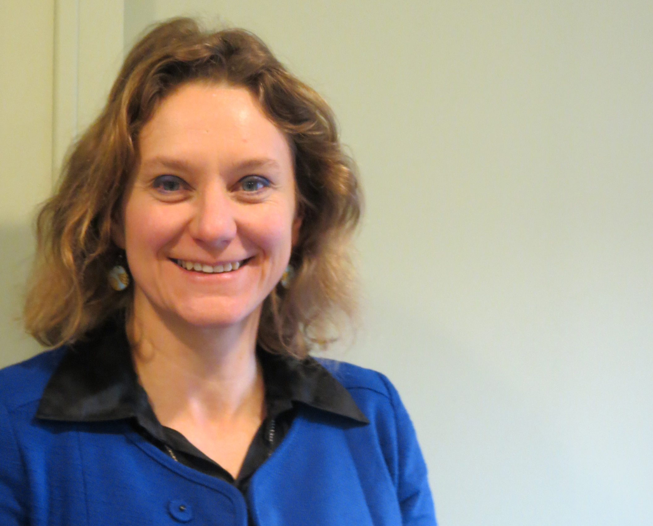 Anne-Catherine Robert-Hauglustaine, directrice générale de l'ICOM